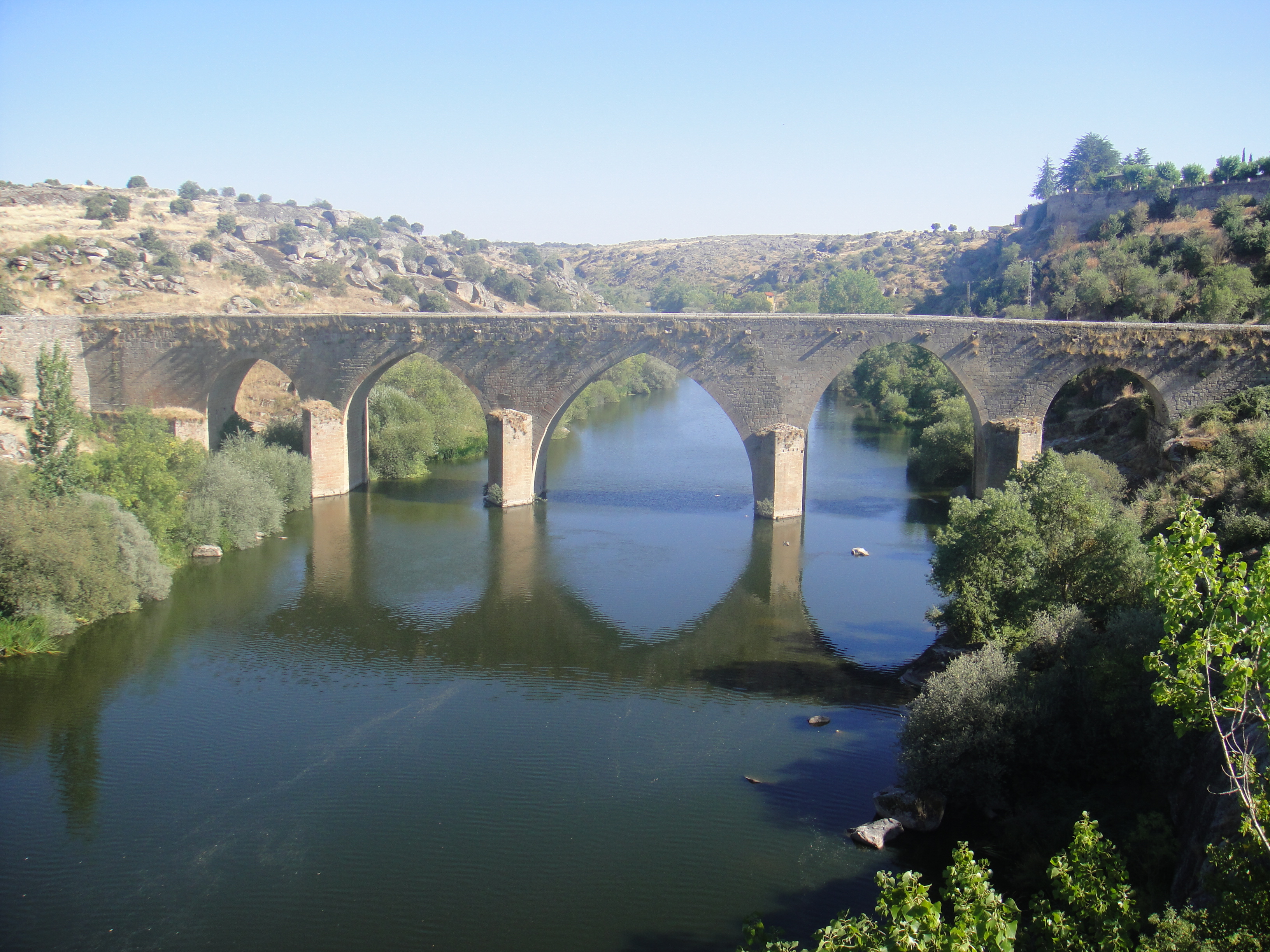 Puente Viejo de Ledesma, provincia de Salamanca, (España).